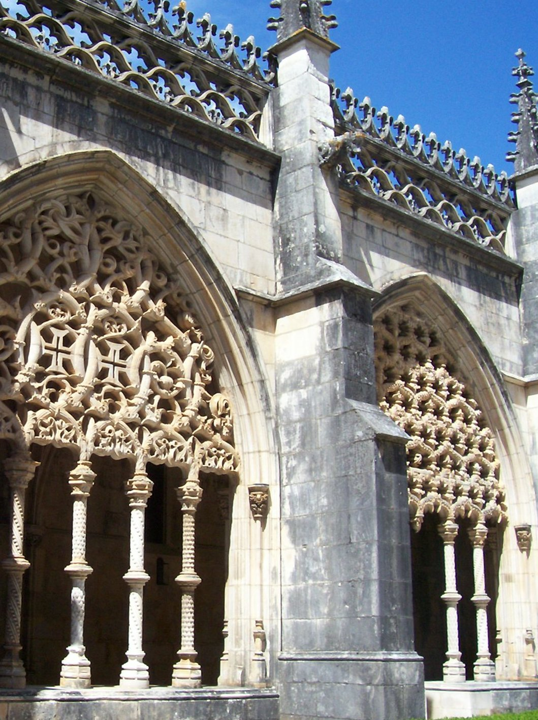 Esta foto participa en el juego En otro lugar de Flickr. Si no perteneces al grupo, no contestes, por favor. Si quieres contestar, únete